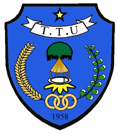 Lambang kabupaten timor tengah utara